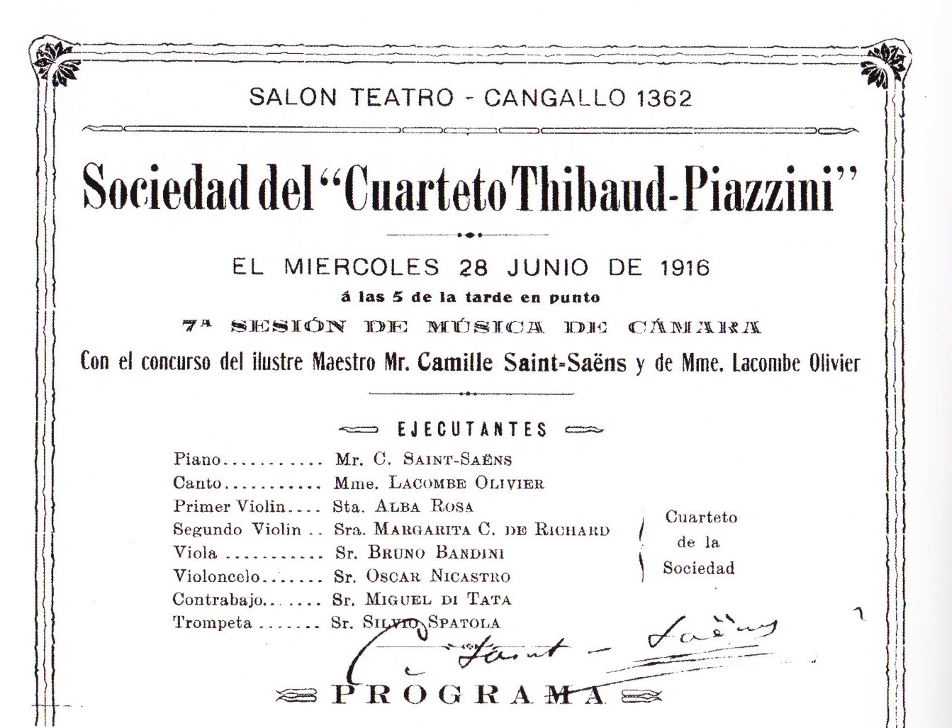 Alba Rosa Viëtor speelt met Saint Saëns op de piano in Argentinie